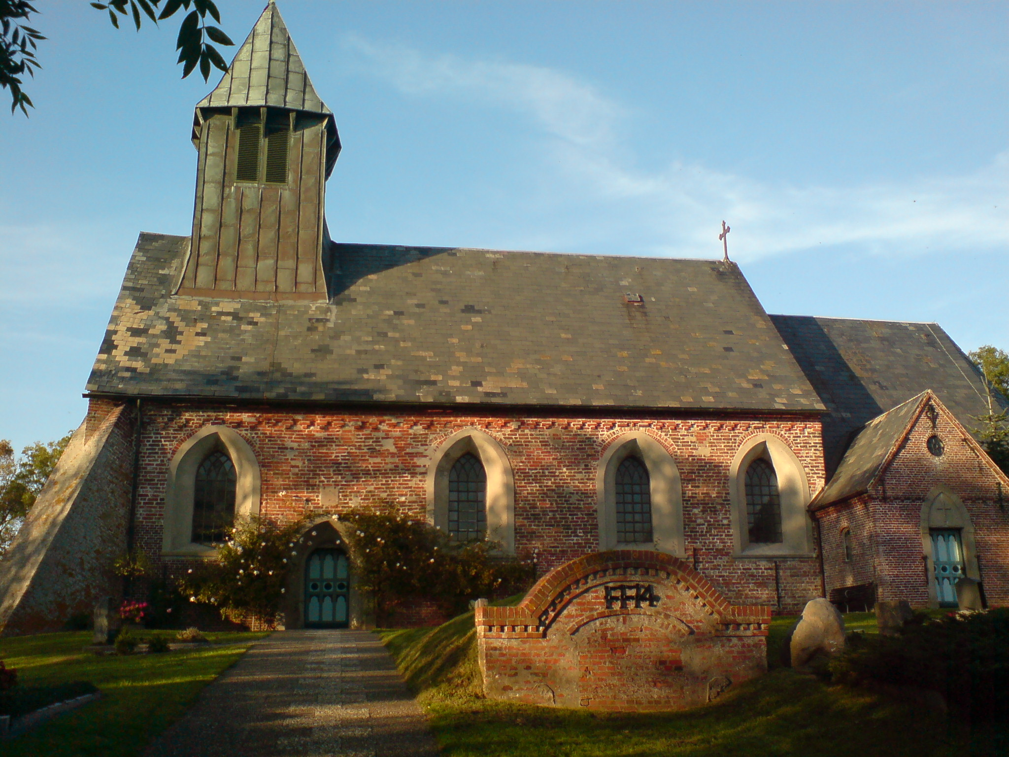 Ansicht von Süden